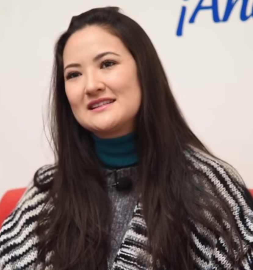 Hiromi en una entrevista en 2017